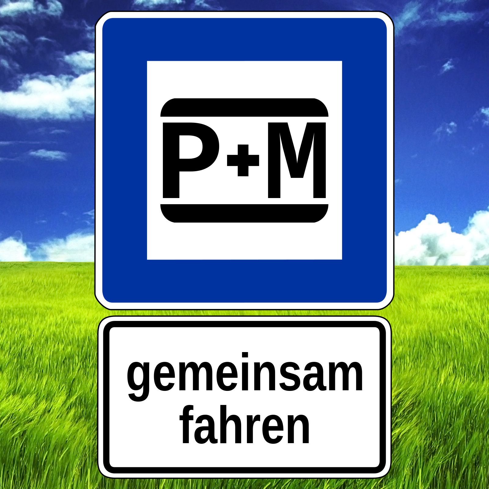 Parken und Mitfahren mit dem Hinweis "gemeinsam fahren"